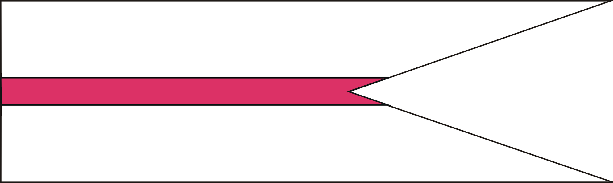 Barwy - proporczyk 2 Pułku Szwoleżerów Rokitniańskich (proporczyk na lancach)